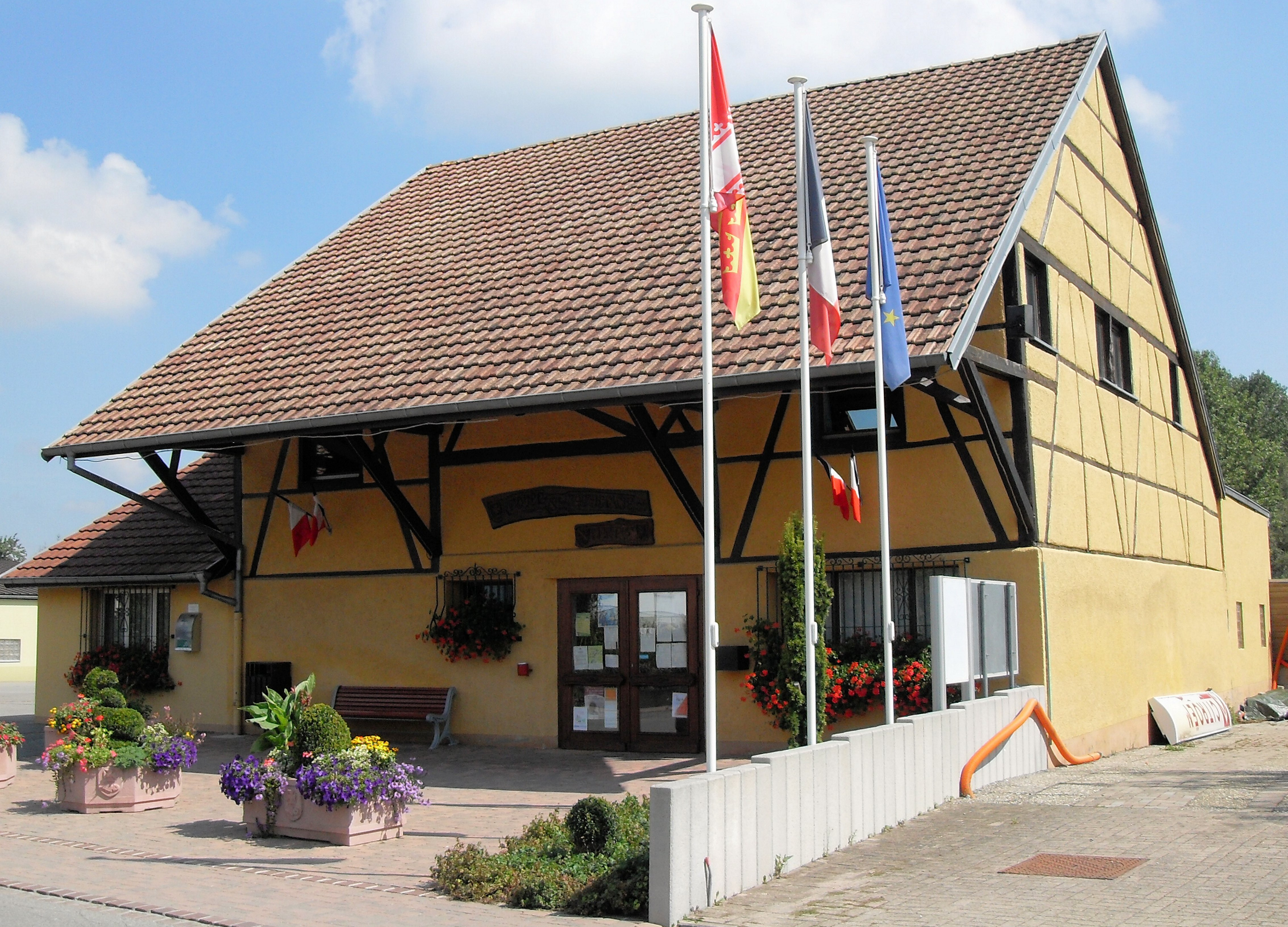 La mairie de Hagenthal-le-Haut